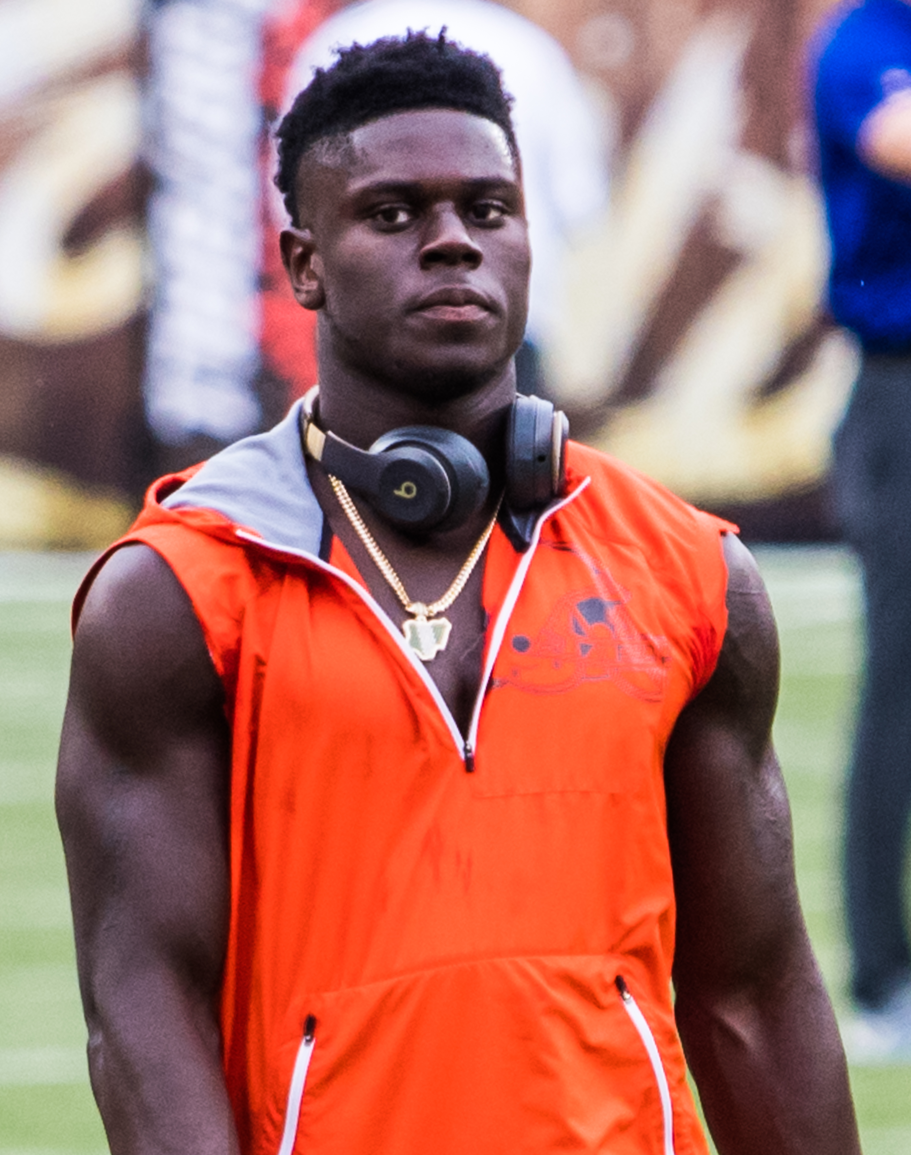 David Njoku